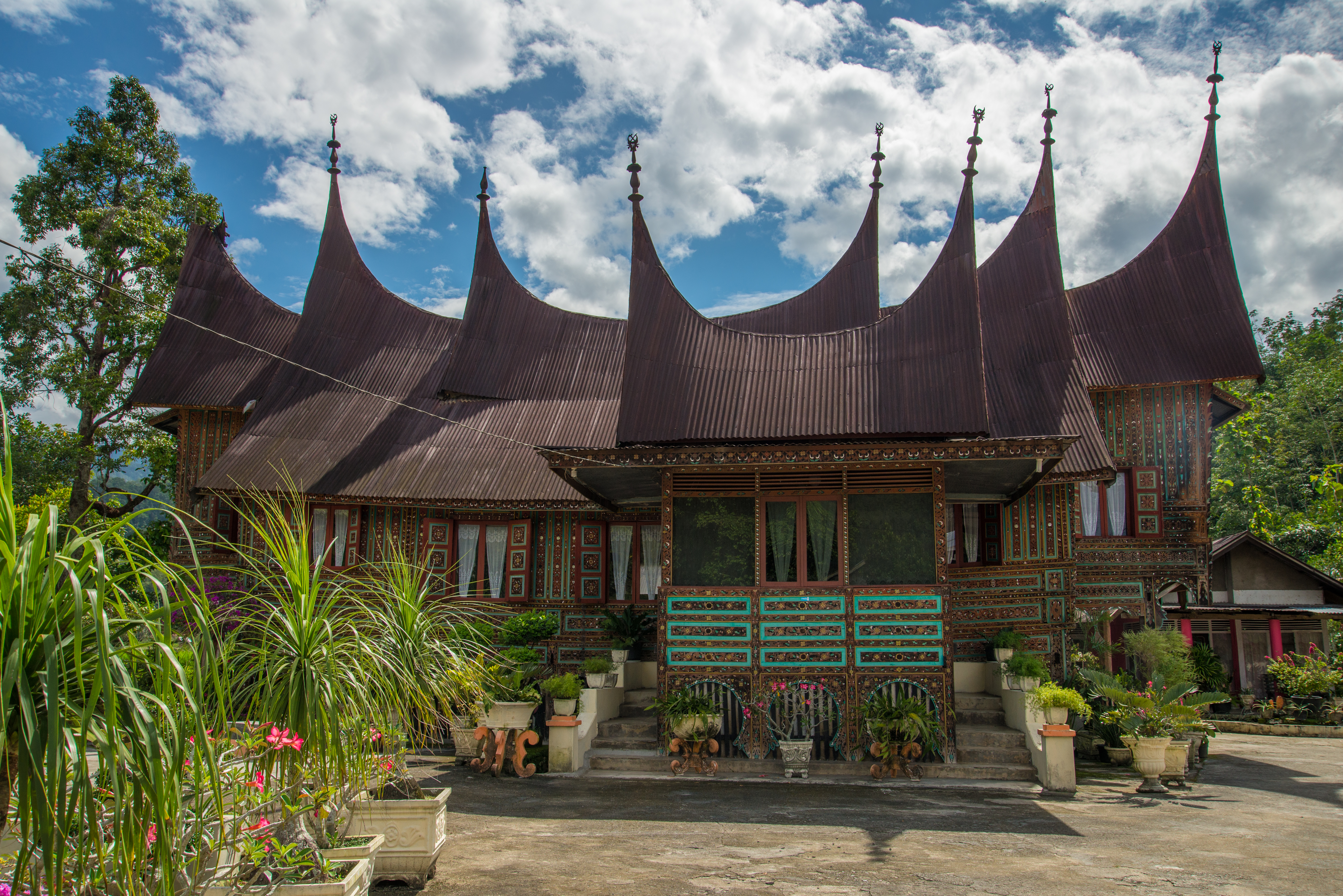 Rumah Gadang